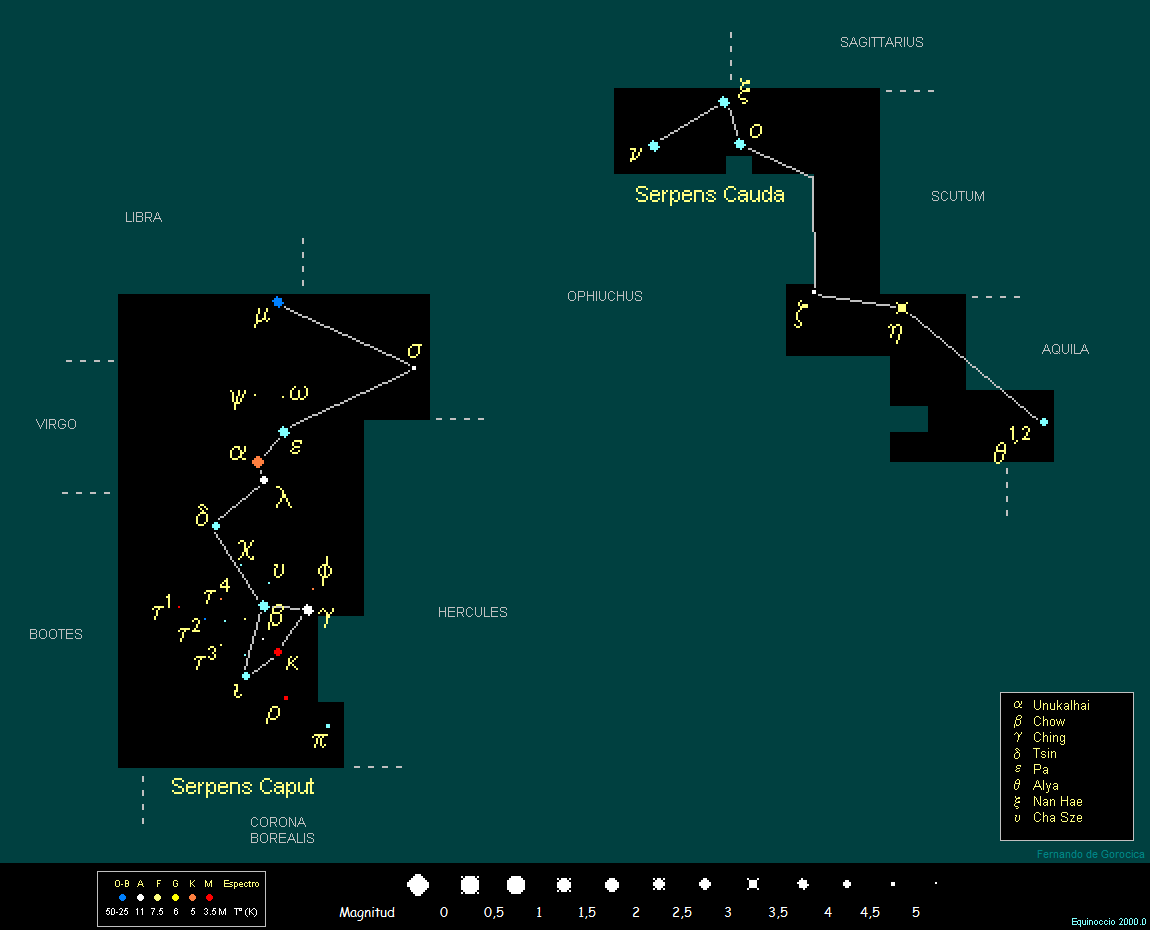 SERPENS CAUDA Y SERPENS CAPUT. Del latín: La cola (cauda) de la serpiente y la serpiente muerta (caput). Son dos constelaciones de una sola, Serpens, que es sostenida por el ofiuco, el serpentario o el encantador de serpientes. Constelación del Hemisferio: NORTE-SUR (Ecuatorial). Alfa, UNUKALHAI - Del árabe: Unuk- al-Hayya, "el cuello de la serpiente". Estrella anaranjada. Beta, CHOW - Del chino: el nombre de una de sus dinastías imperiales. Gamma, CHING - Del chino. Delta A y B, TSIN - Del chino. Epsilon, PA - Del chino: nombre de un territorio certero en China. Theta 1 y 2, ALYA - Del árabe: probablemente contracción de: al-Hayya, "la serpiente". Estrella doble, ambas componentes blancas. Xi, NAN HAE - Del chino: el mar del sur. Upsilon, CHA SZE - Del chino: el mercado del carruaje.